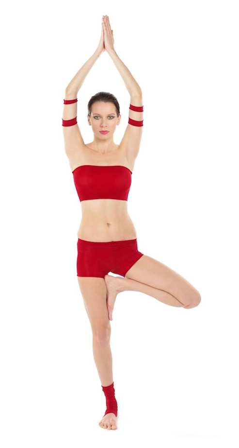 Vriksasana by Nina Mel, Yoga Teacher